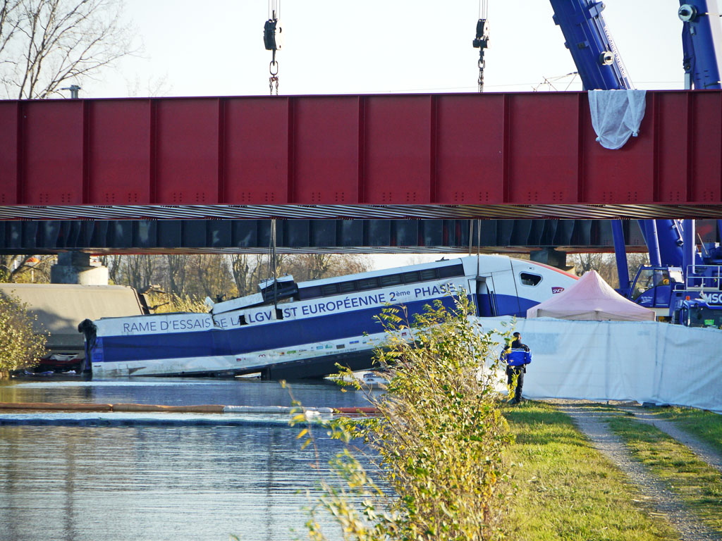 Relevage de la motrice TGV Dasye 29787 (rame 744) après l'accident Eckwersheim, survenu durant une marche d'essais le 14/11/2015. Image partagée sur Flickr